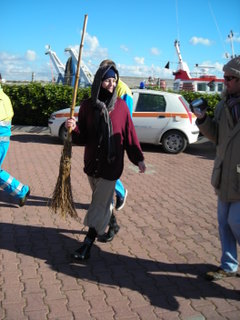 Underwater crip - Campomarino di Maruggio (Italy)